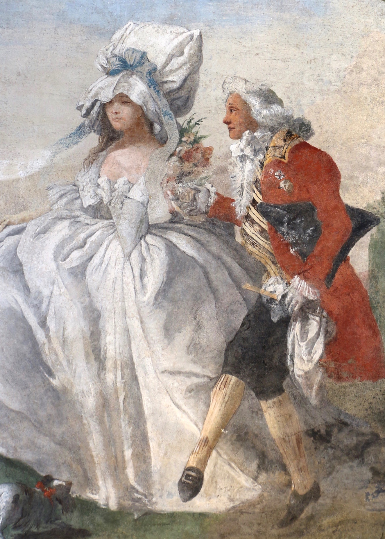 Giandomenico Tiepolo (1727–1804): Minuetto in villa. Affreschi da villa di Zianigo (1759–1797). Ca’ Rezzonico (Venezia). Dettaglio.